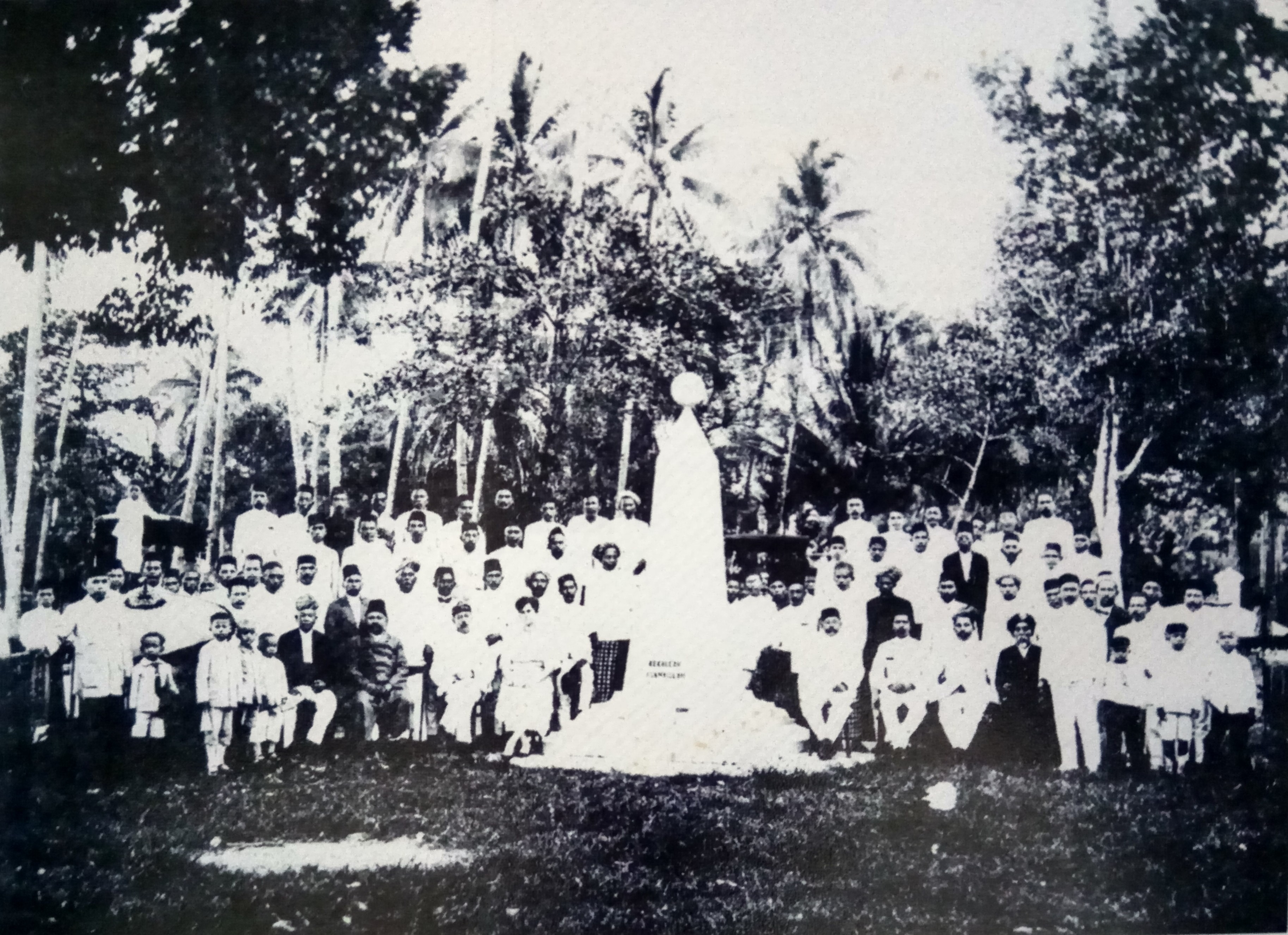 Peresmian Tugu Pemuda 1917